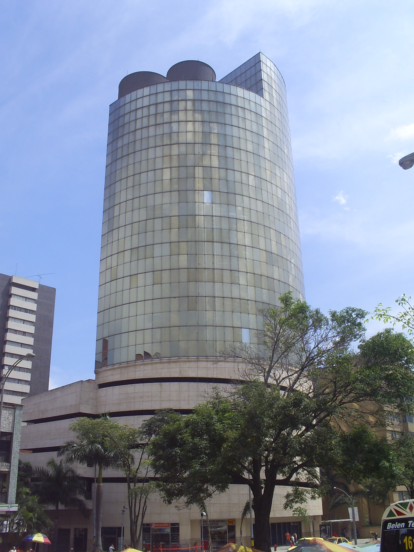 Edificio Argos, Medellín, Colombia